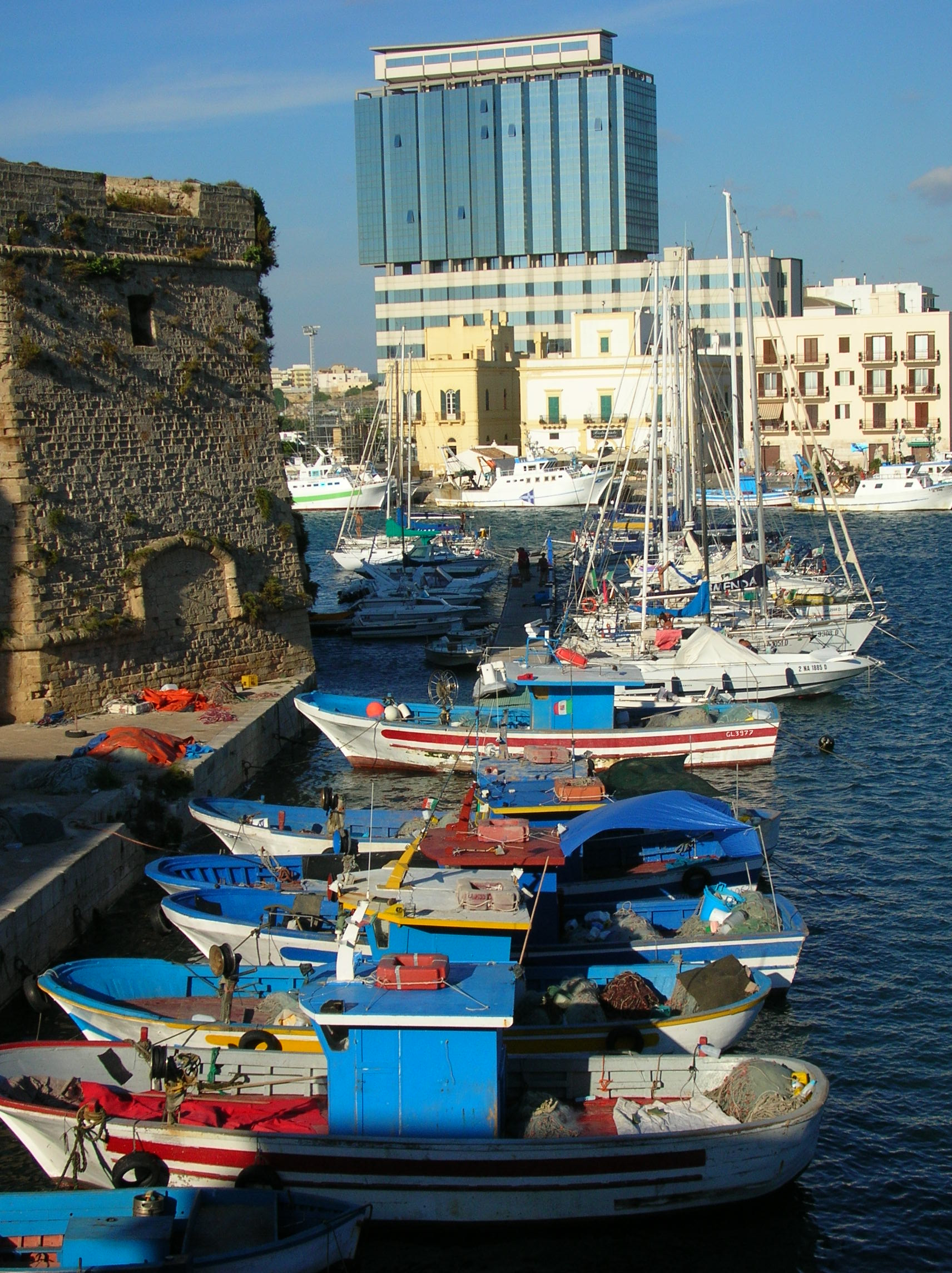 Gallipoli (Italie) vu de la vielle ville